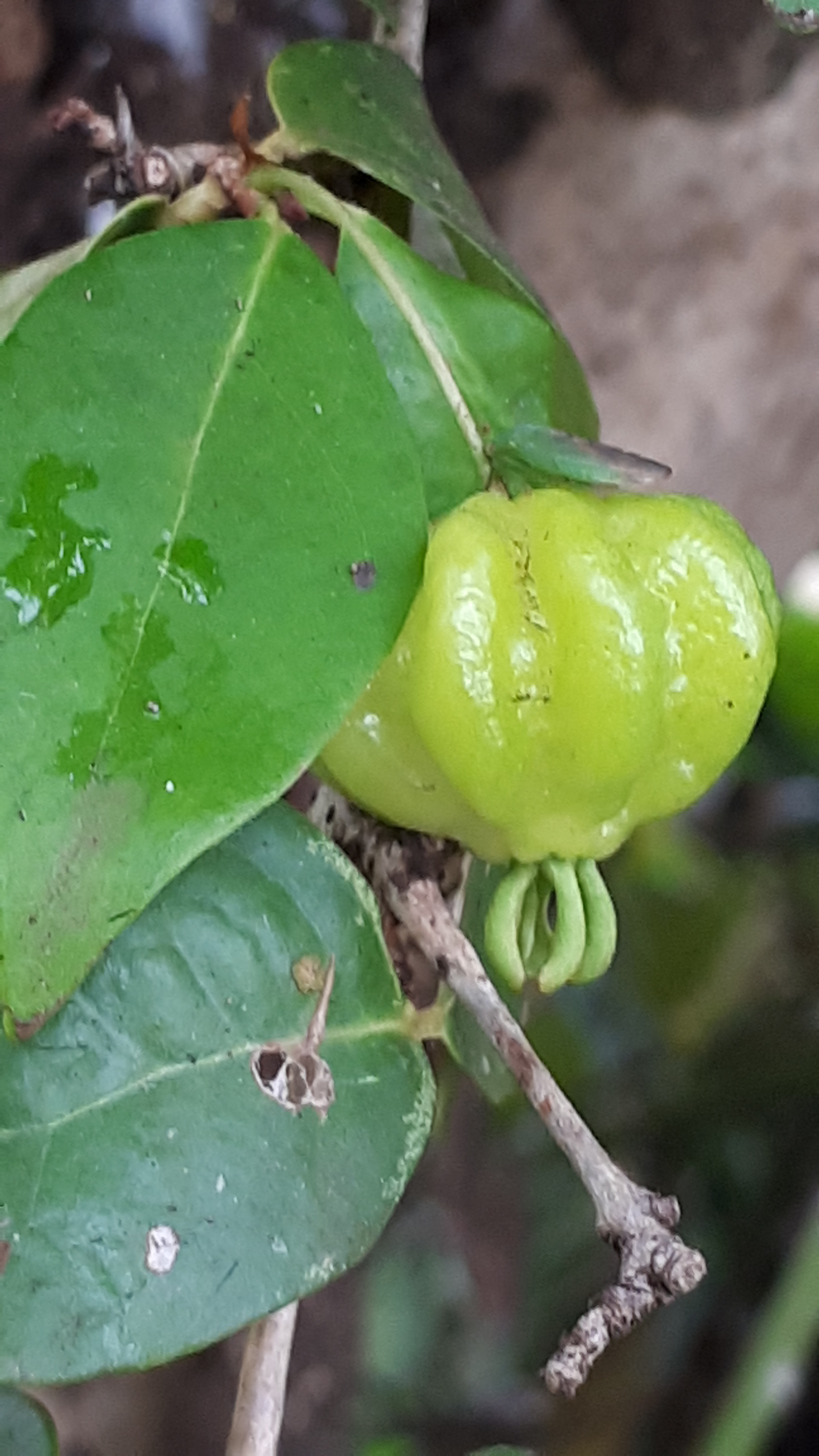 Foto do fruto de pitanga verde registrado na cidade de Ribeirão Preto-SP.